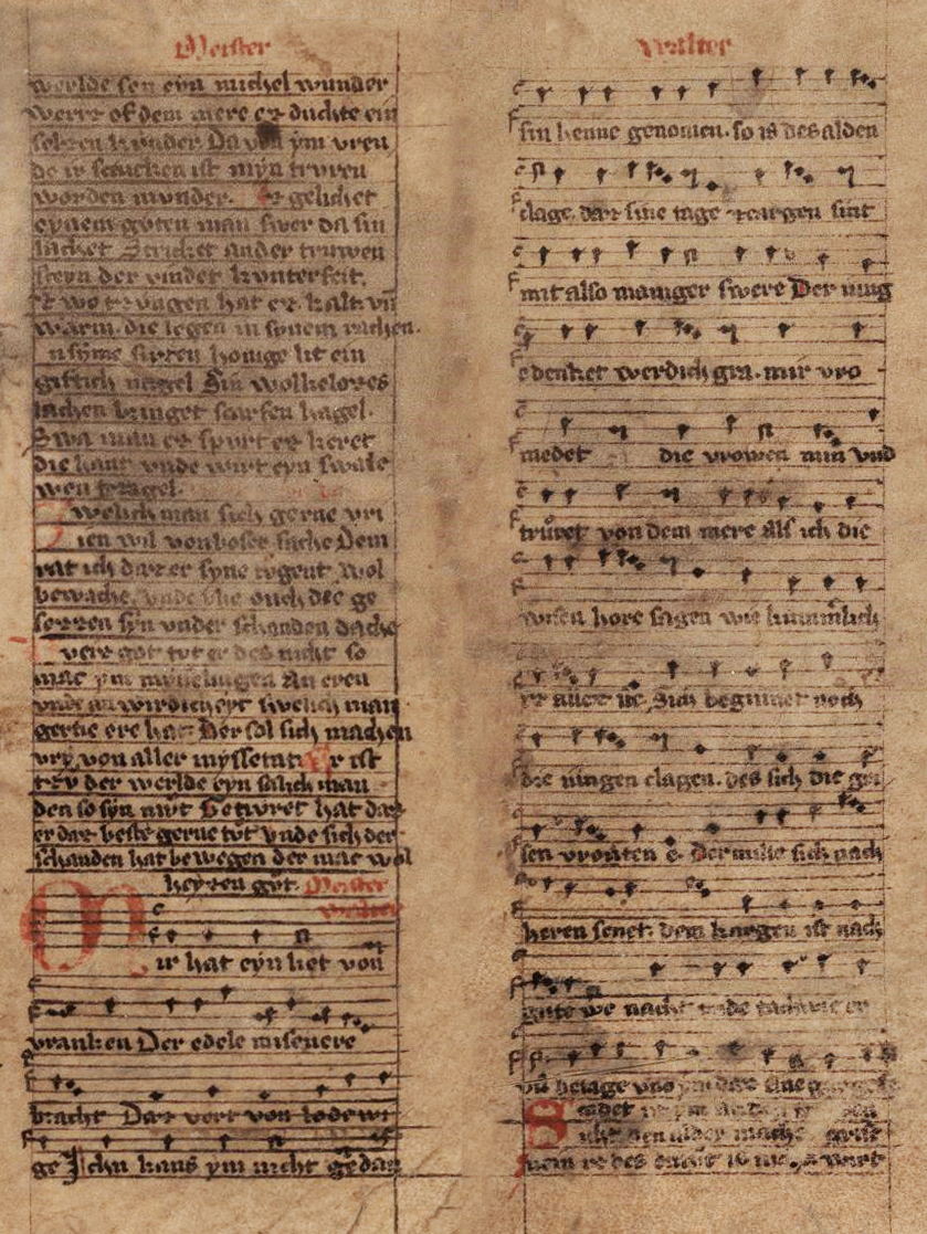 Text und Noten aus dem Jenaer Liederhandschrift-Fragment in Münster. Bearbeitet.